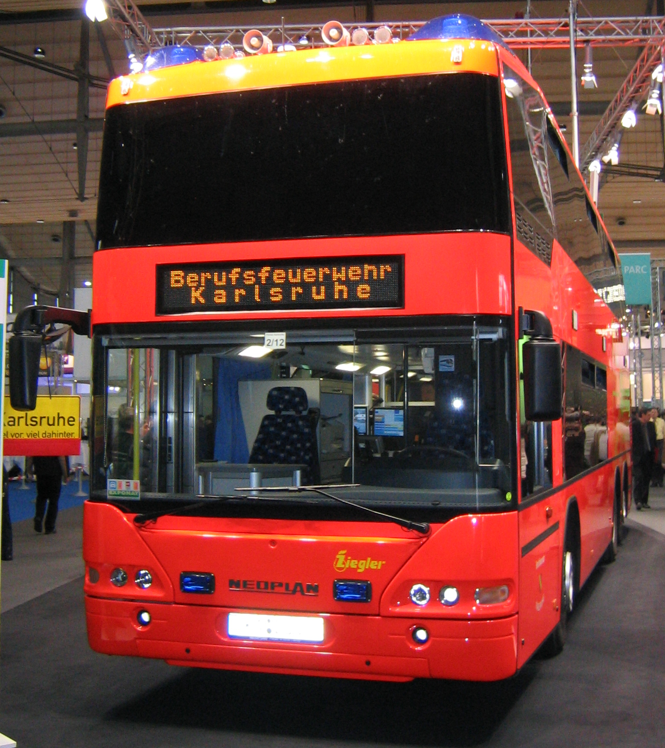 Einsatzleitwagen Stadt Karlsruhe (für Großveranstaltungen und im Katastrophenfall) auf der CeBIT 2008 Fahrzeug: Neoplan Stahlkarosserie (LxBxH) 12 x 2,5 x 4 m Motor 260 kW, Luftfederung, Klimaanlage 35 kW, GPS, Rückfahrkamera Feuerwehrausstattung von Ziegler 30 kW Stromerzeuger Zulässiges Gesamtgewicht 22t, Vmax 100 km/h Information und Kommunikation (Siemens Enterprise Communications): IP-Lichtwellenleiternetz (1000 Base-SX) Kommunikationsanlage HiPath 3500 IP-Funk-Draht-System VBAS-B mit Notrufabfrage Funkanbindung (Analog - BOS, Digital - TETRA) Video- und Einsatzleitrechner-Integration Draht und Funk Sprachdokumentation Audio- und Videotechnik, DVB-S-TV-Empfang PC-Arbeitsplätze mit Softclients für Funk-Draht-Abfrage und zentrale File-/Druckservices DECT-Cordless mobile Außenkommunikation